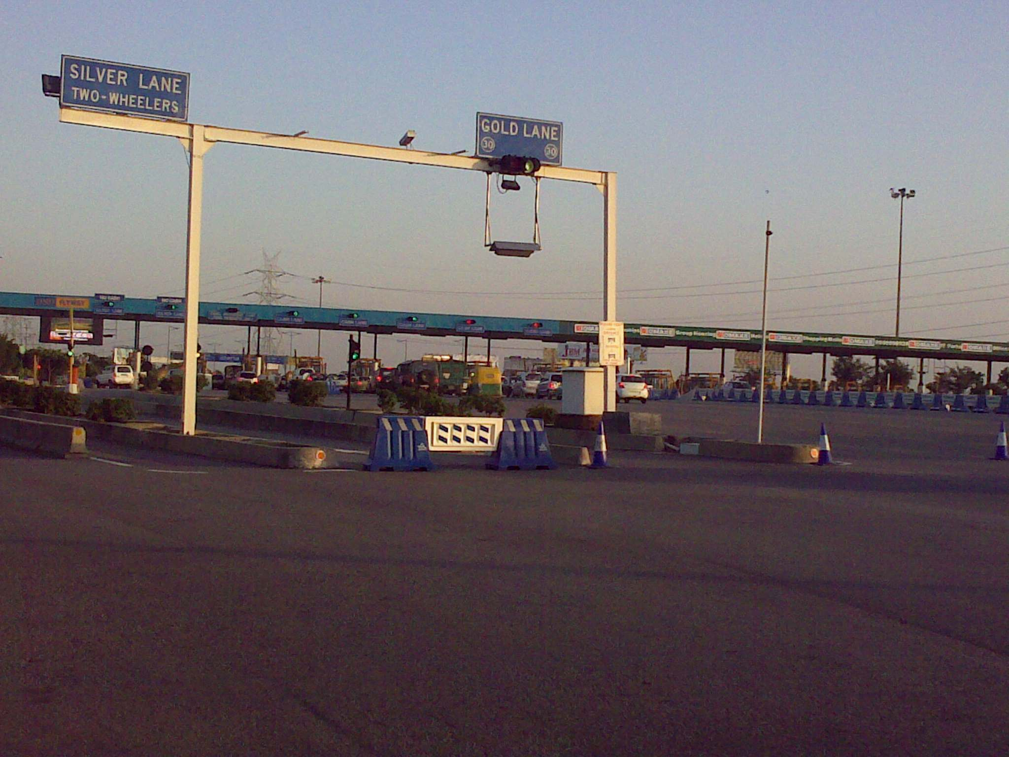 ഡെൽഹി നോയിഡ ടോൾ പ്ലാസാ